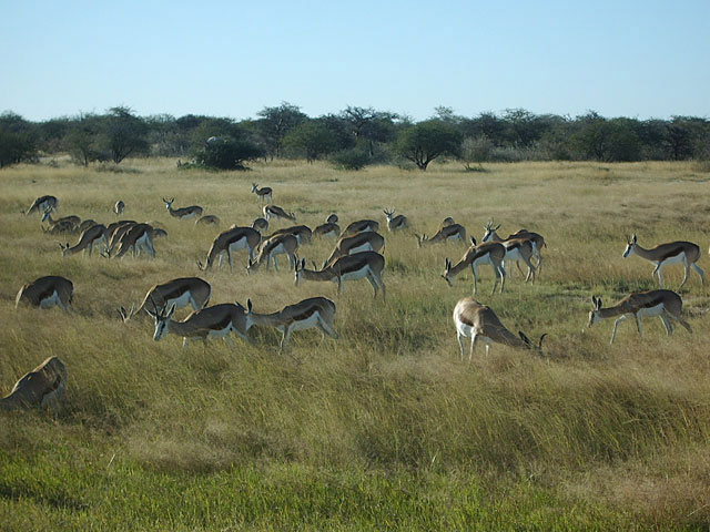 Springboecke in Namibia